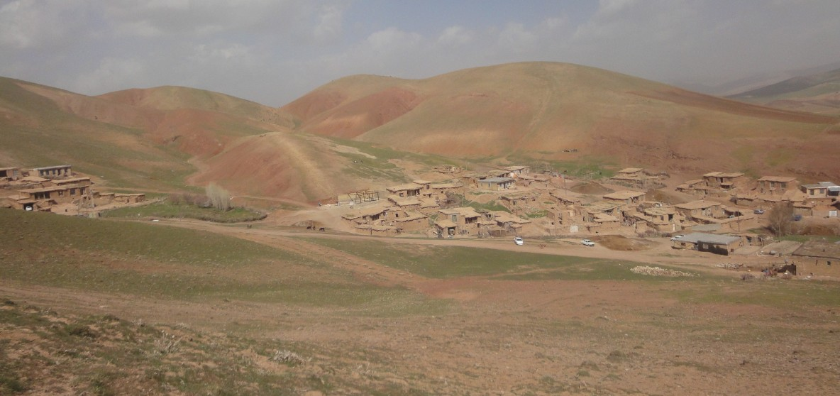 روستای گلستانک